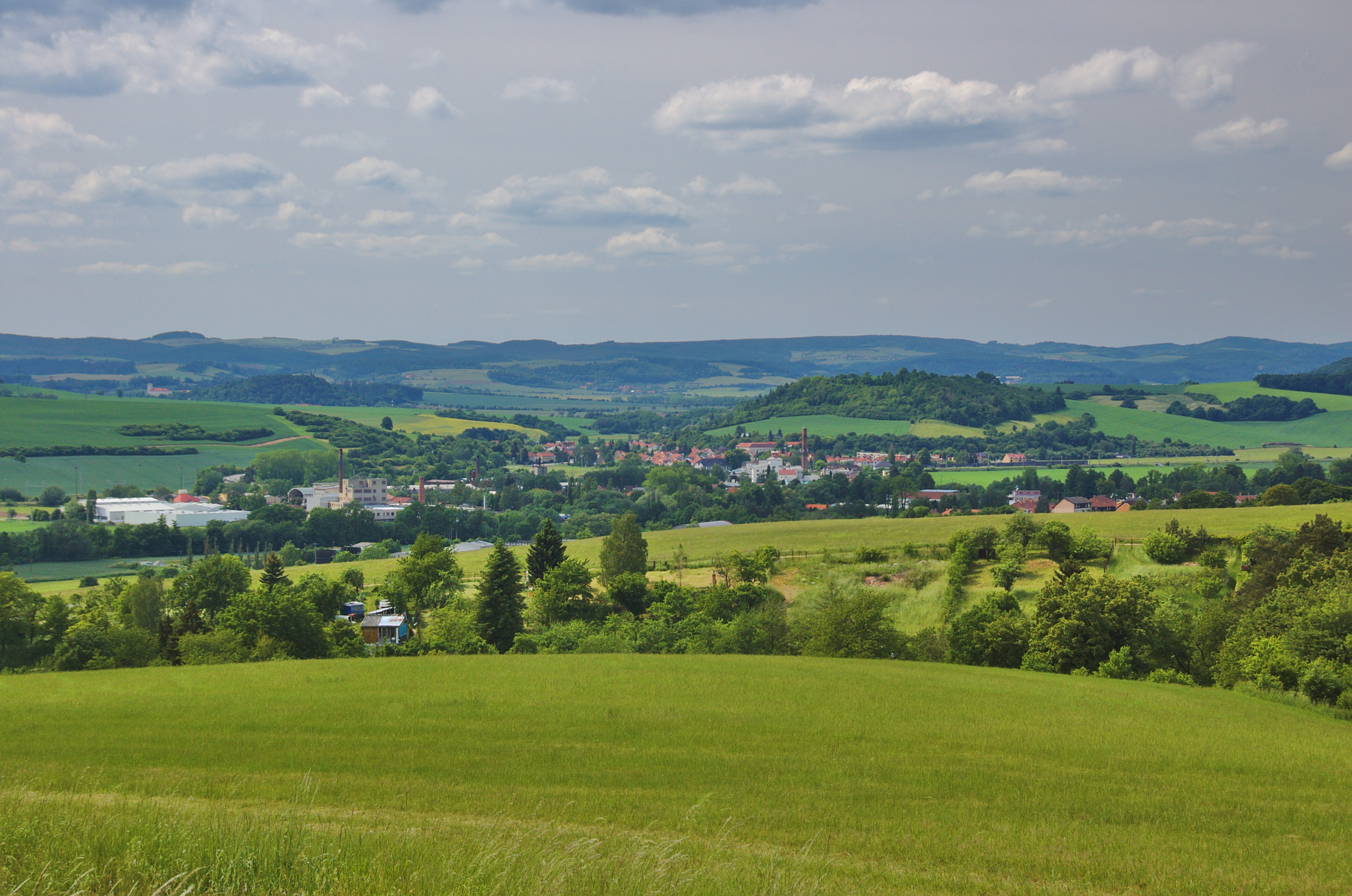 Pohled na Rájec-Jestřebí z cesty mezi Karolínem a Ráječkem, okres Blansko